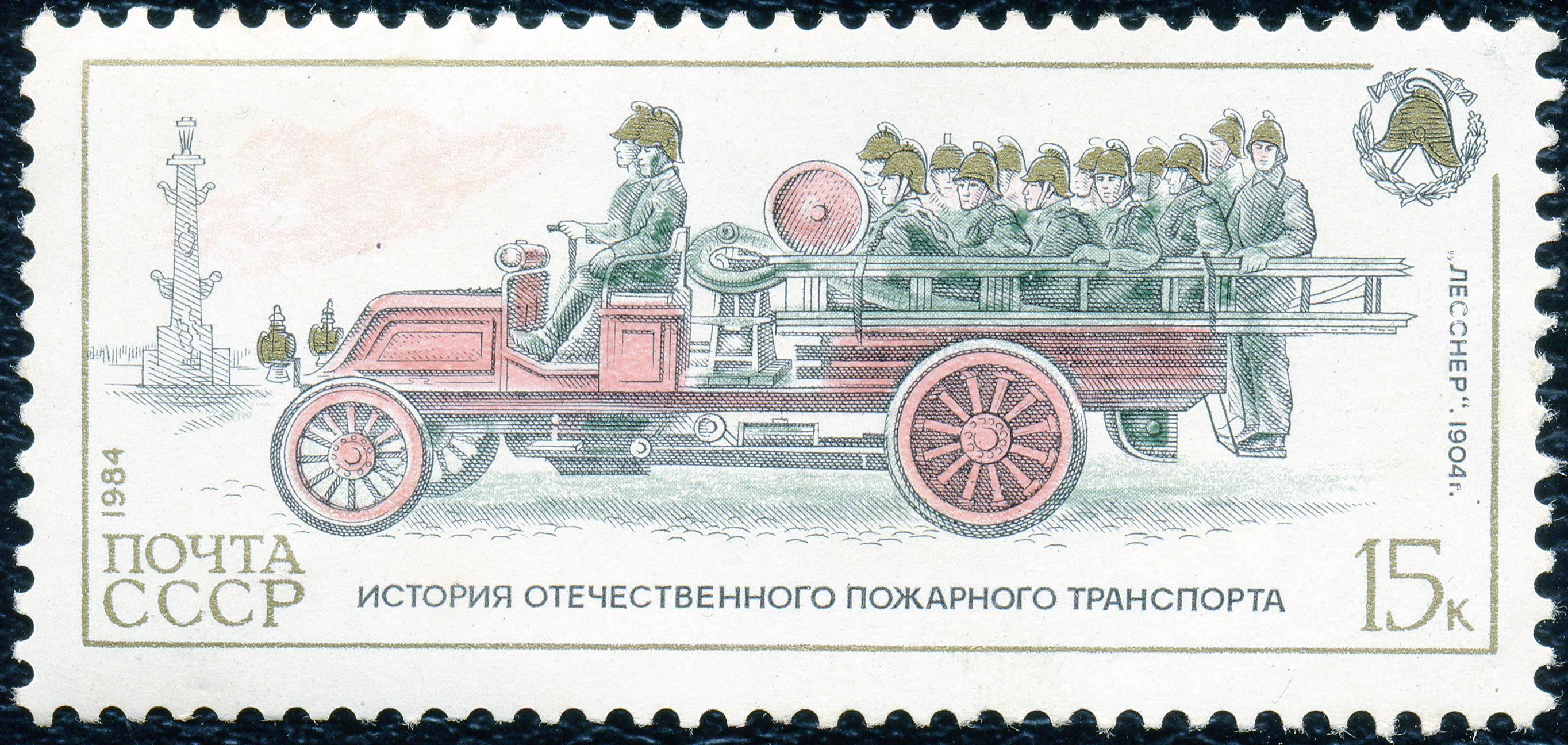 Почтовая марка СССР. 1984. Лесснер